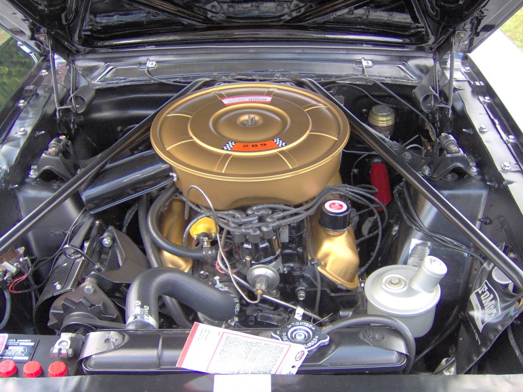 1965 Ford Mustang 289 Windsor